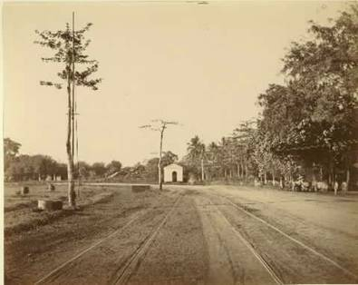 Salemba Tempo Doeloe